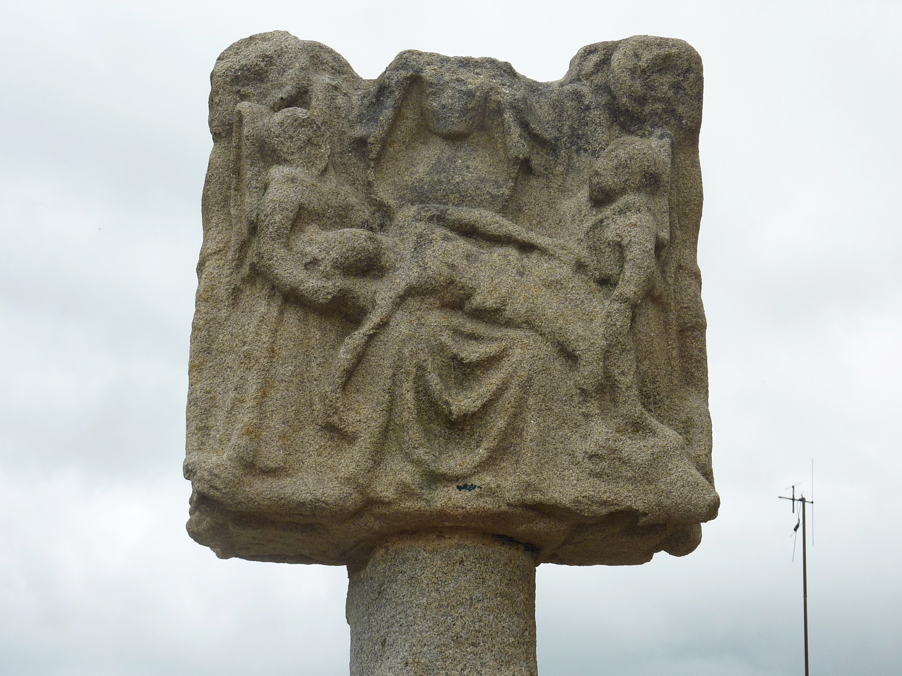 Collorec : Vierge de Pitié aux Anges (XVe siècle ; haut-relief sculpté ; restauré en 2003) près de l'église paroissiale